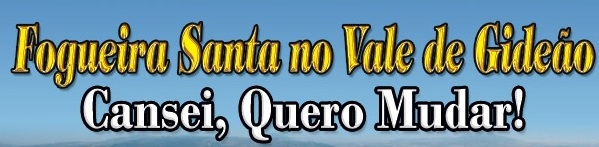 Letrerio da Fogueira Santa de dez de 2012